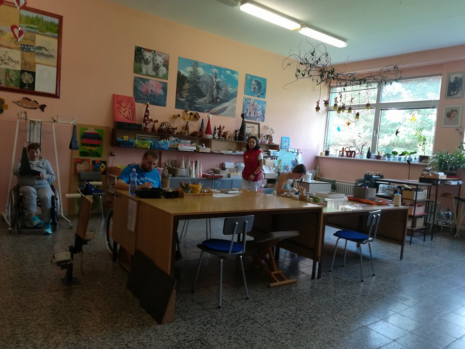 Grafická dielňa na ergoterapii